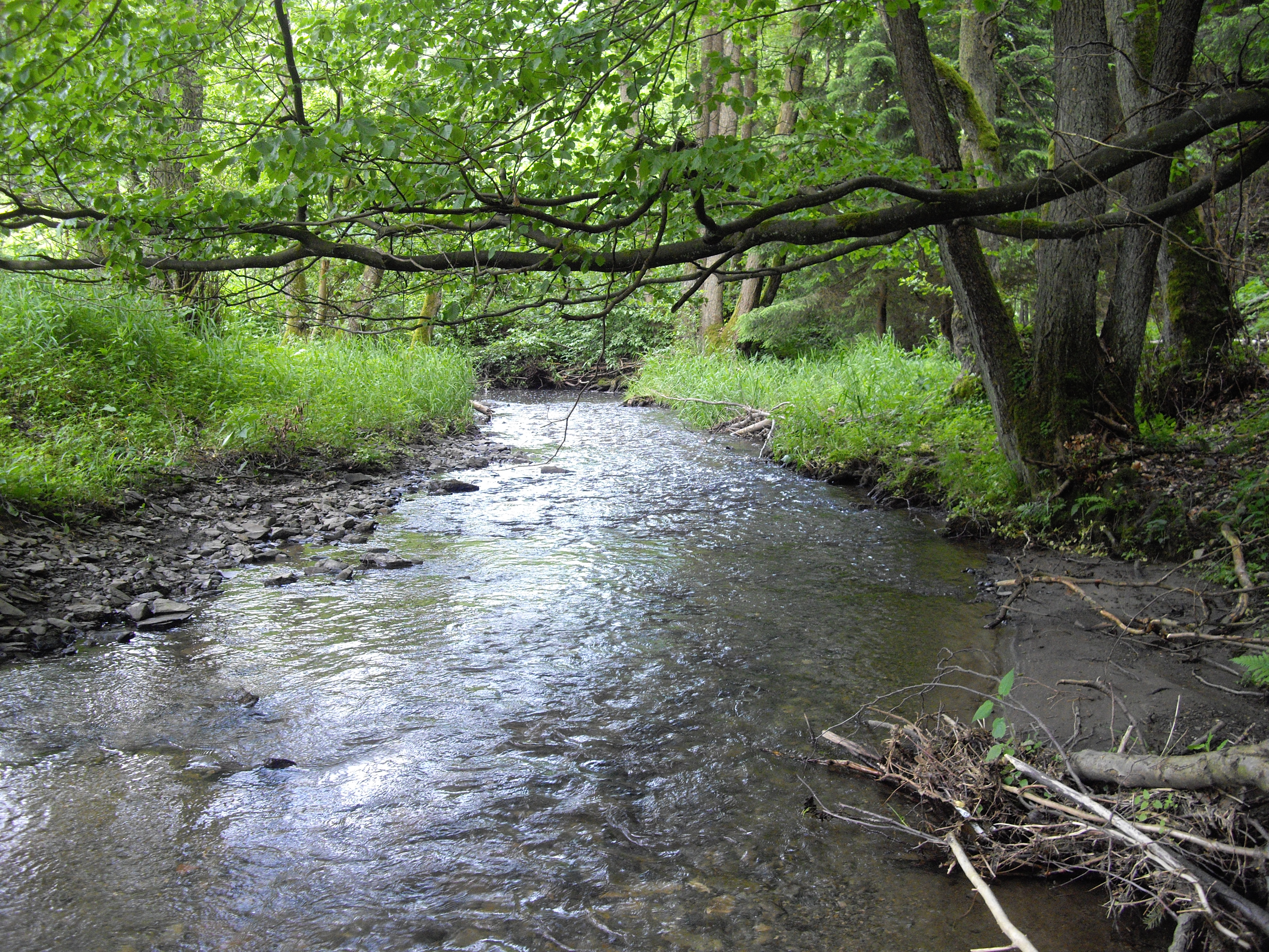 Die Wipper bei Dankerode im harz, fotografiert wurde von einem Kiesbett in der mitte des Flüsschens aus